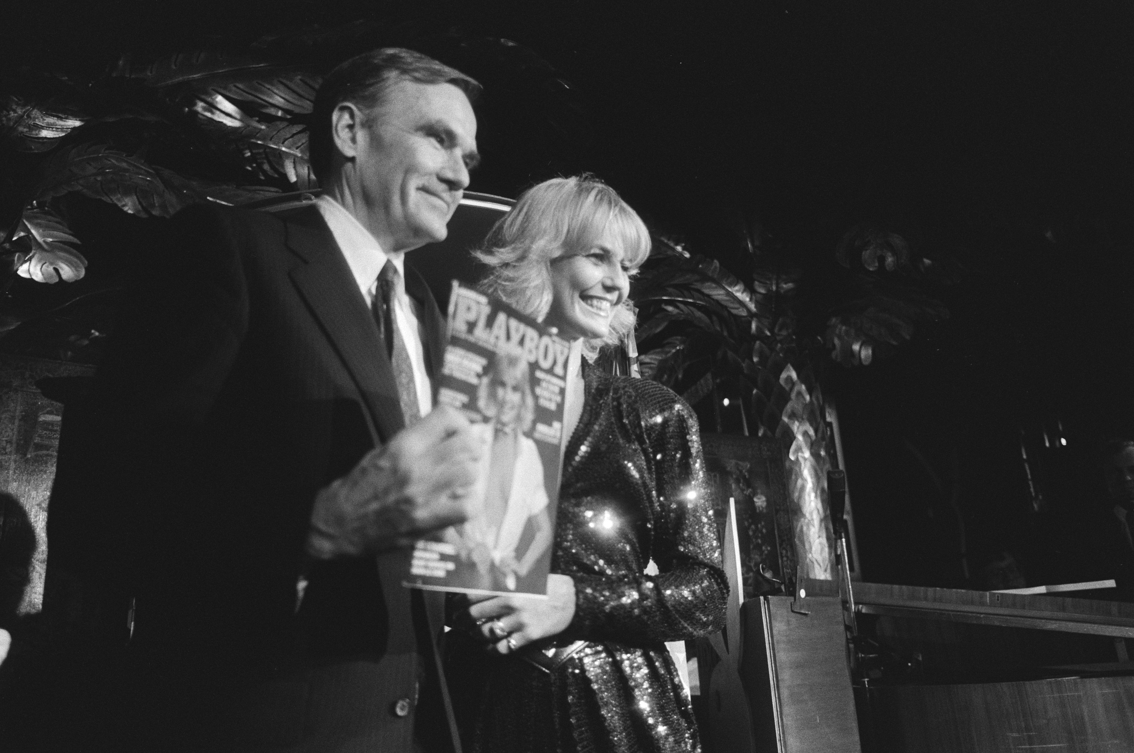 Collectie / Archief : Fotocollectie Anefo Reportage / Serie : Presentatie van de eerste Nederlandstalige Playboy in Amsterdam Beschrijving : Chef van de afdeling buitenland van Playboy Lee Hall met Ellen Soeters Datum : 18 april 1983 Locatie : Amsterdam, Noord-Holland Trefwoorden : fotomodellen, tijdschriften Persoonsnaam : Hall, Lee, Soeters, Ellen Fotograaf : Bogaerts, Rob / Anefo Auteursrechthebbende : Nationaal Archief Materiaalsoort : Negatief (zwart/wit) Nummer archiefinventaris : bekijk toegang 2.24.01.05 Bestanddeelnummer : 932-5642